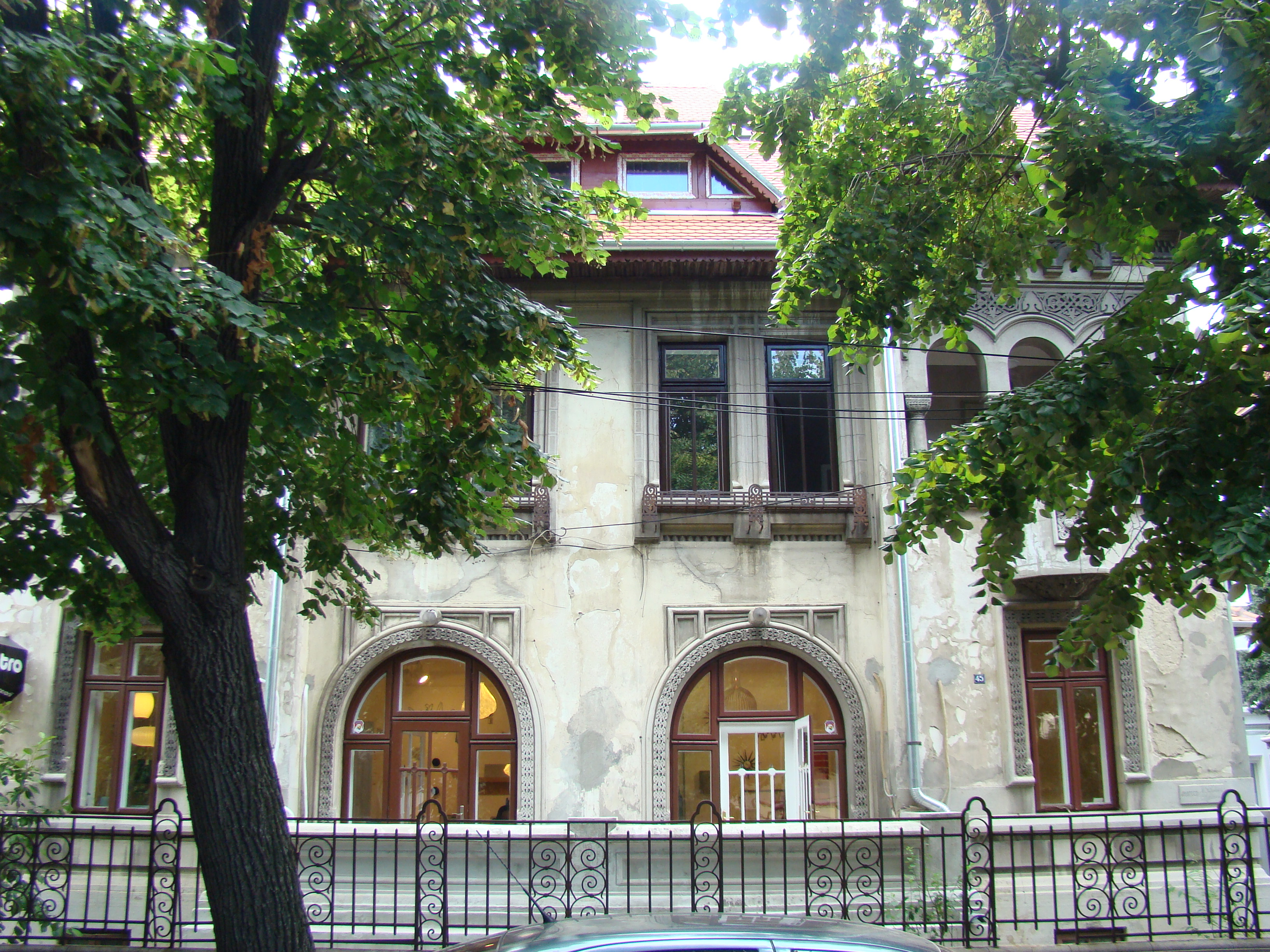 Casă monument istoric, str. Roma, nr. 43-45